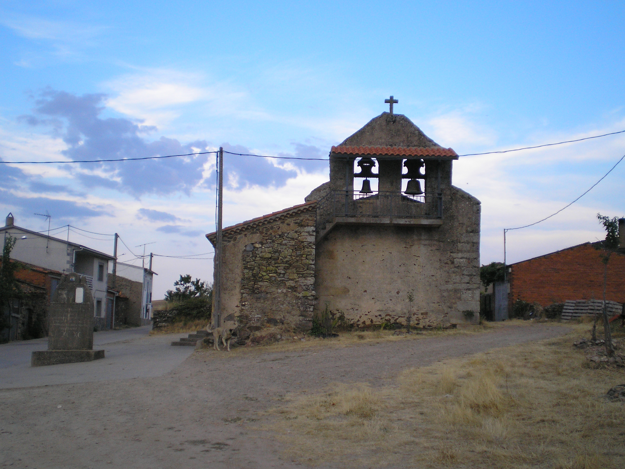 La iglesia de El Poyo de Aliste en Zamora, España.